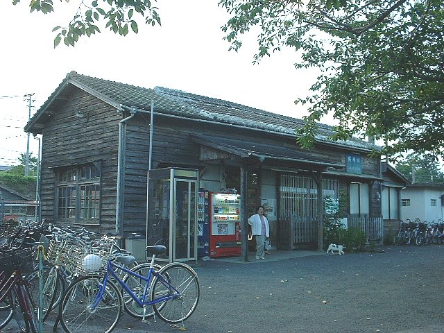 日豊本線 熊崎駅 2005年8月19日 Bakkai撮影